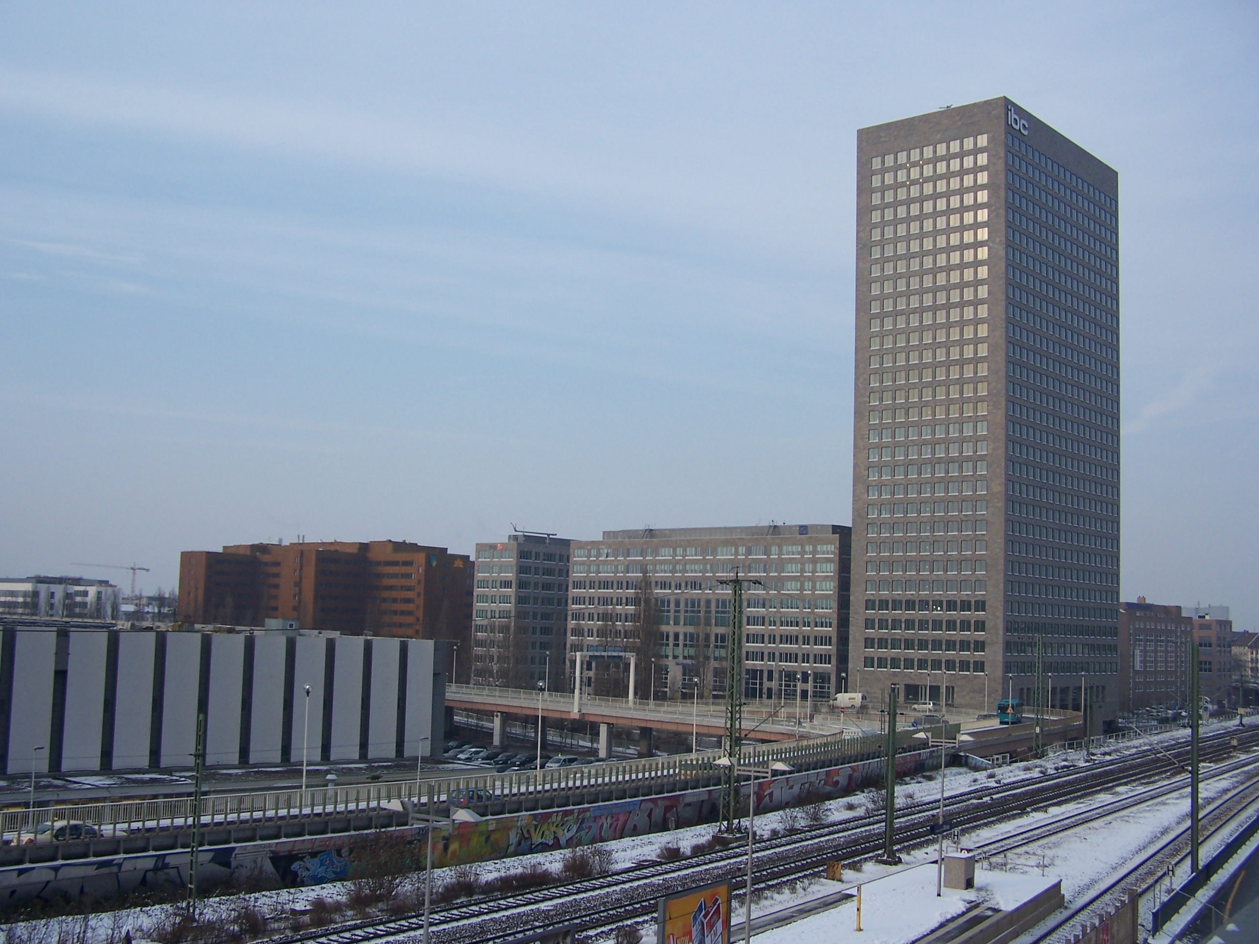 The Deutsche Bank Investment Banking Center in Frankfurt. View from Emser Brücke/Fairgrounds.